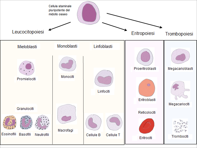 Ematopoiesi, schema sulla formazione delle cellule del sangue